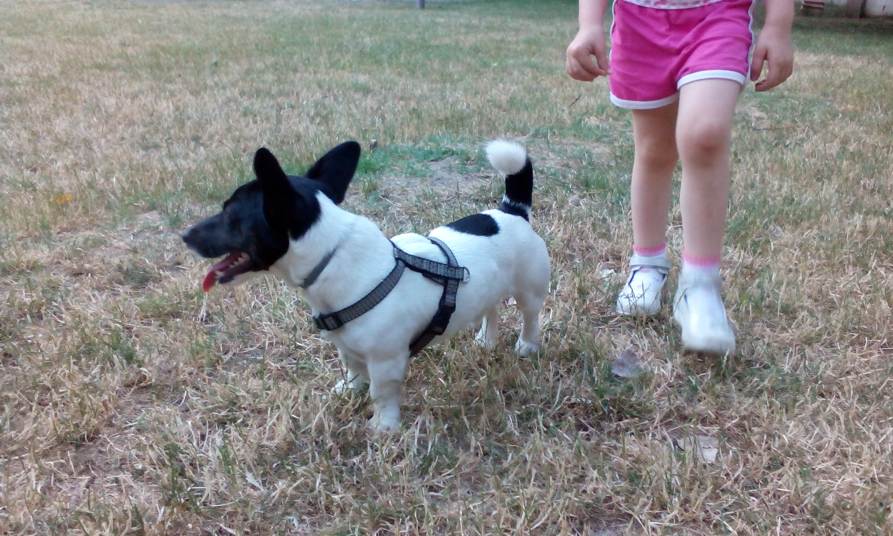 Пси и деца